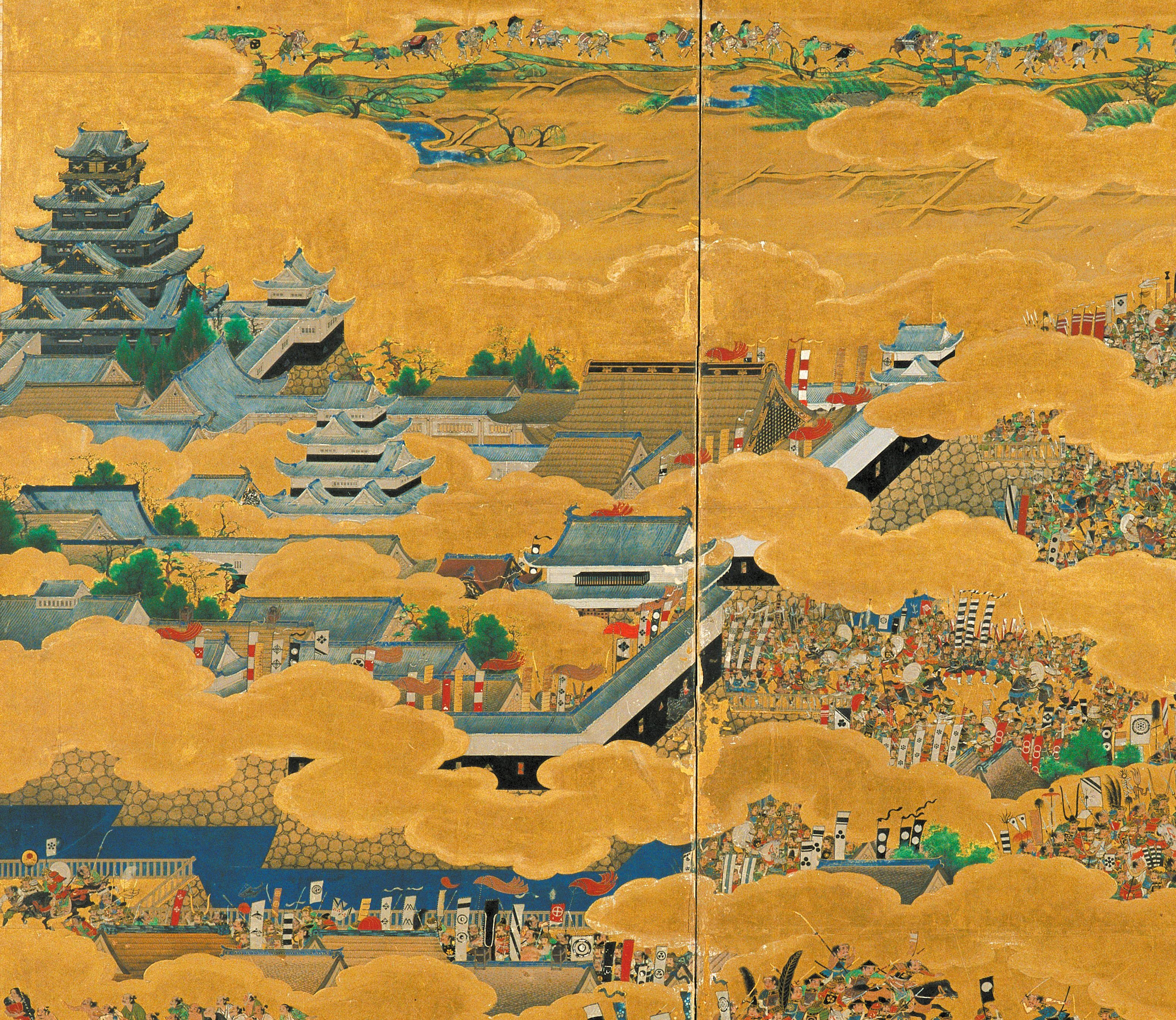 大坂夏の陣図屏風右隻（大阪城天守閣所蔵）に描かれている天正期大坂城天守。現在ある大坂城復興天守（大阪城天守閣、1928年）の外観デザインのモデルとして用いられた絵画資料である。現在の白壁とは異なる黒塗りが特徴。